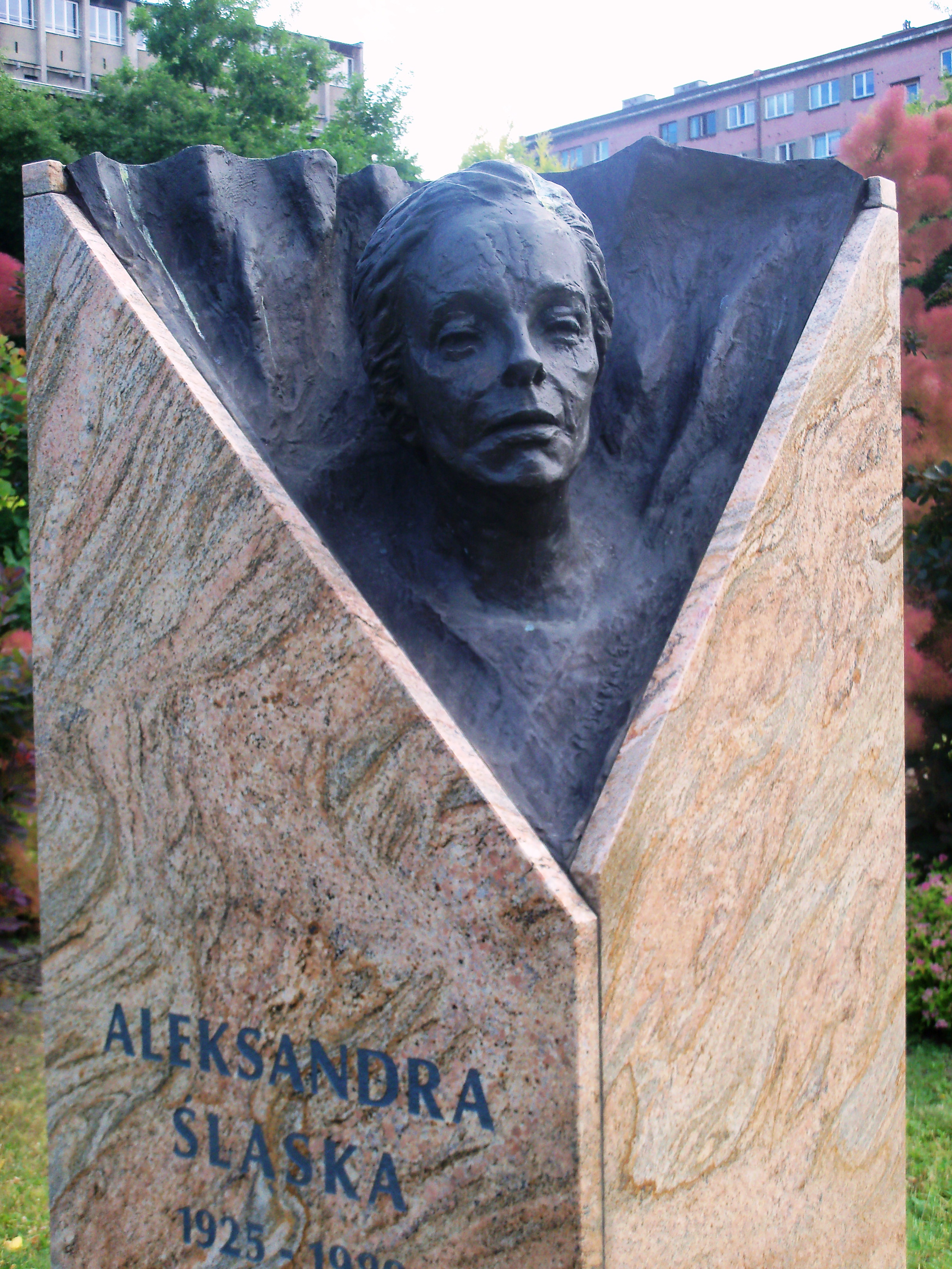 Galeria Artystyczna na placu Grunwaldzkim w Katowicach: Rzeźba przedstawiająca Aleksandrę Śląską